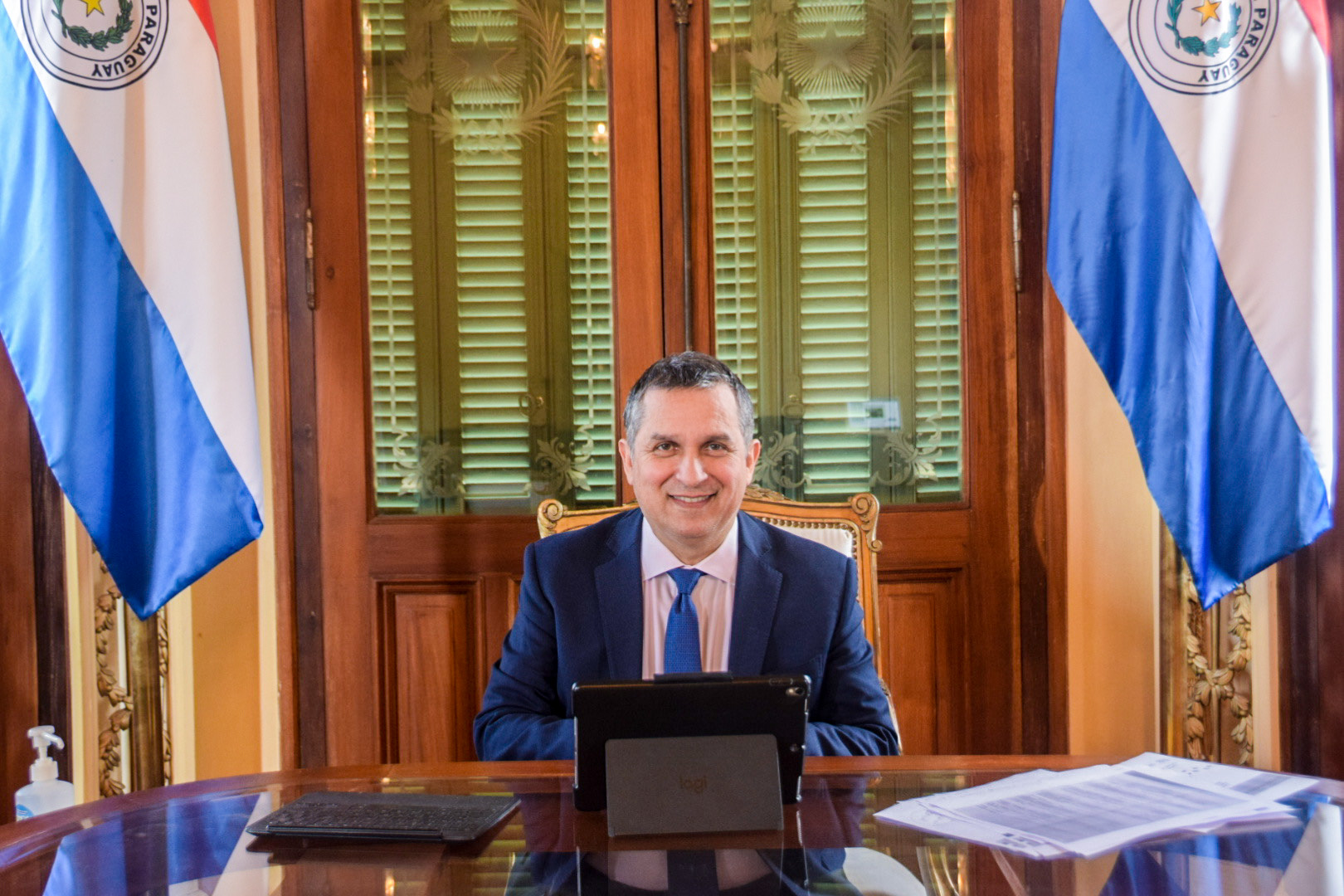 Ministro de la Unidad de Gestión en su despacho